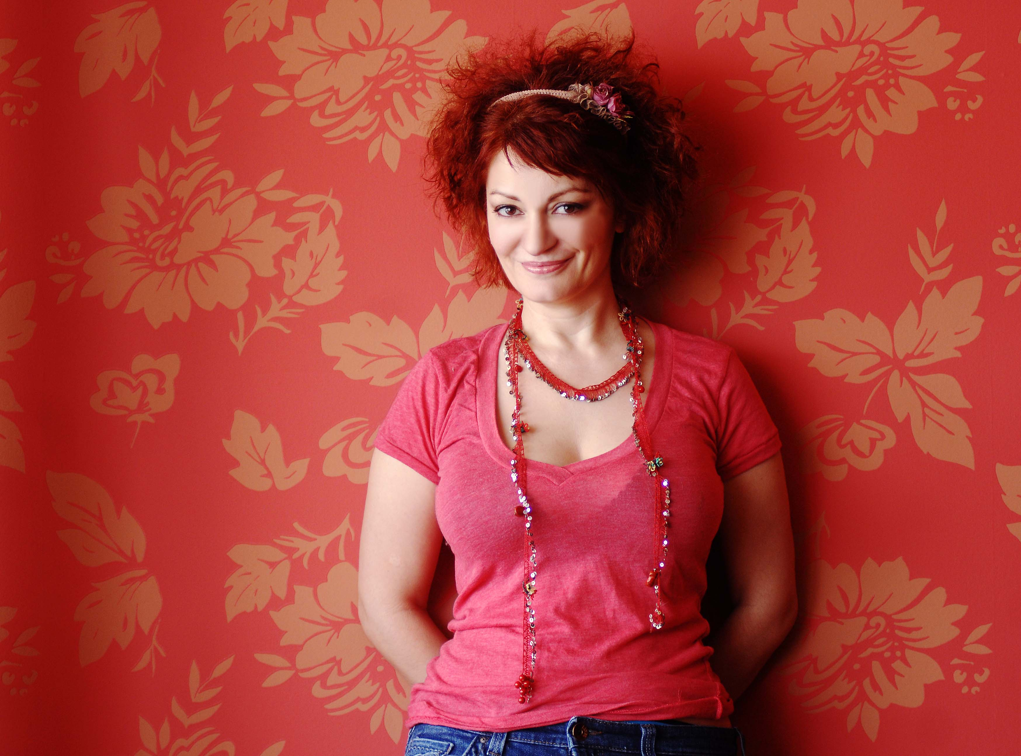 Yasemin Alkaya